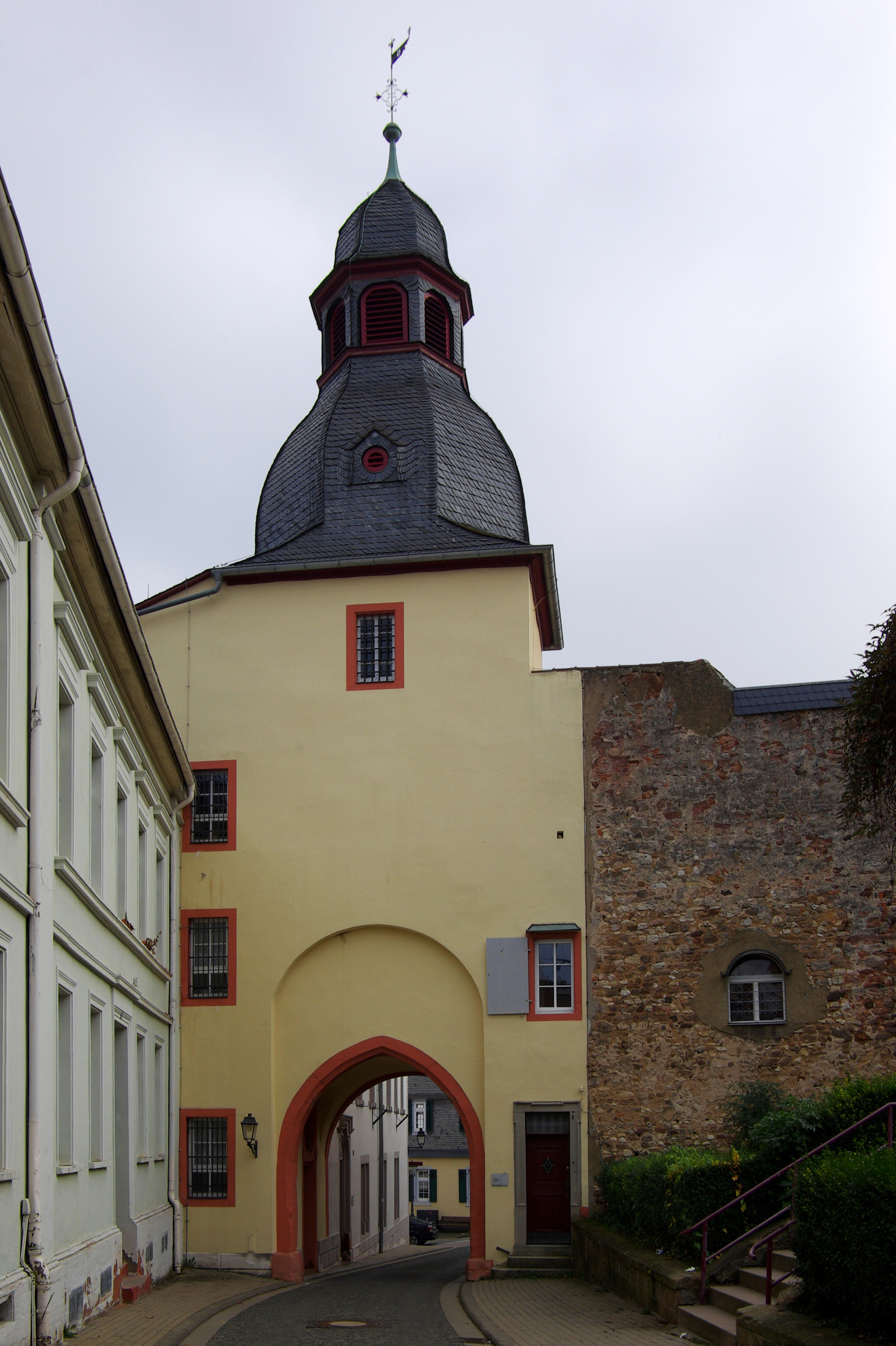 Kirchheimbolanden, Apothekerturm